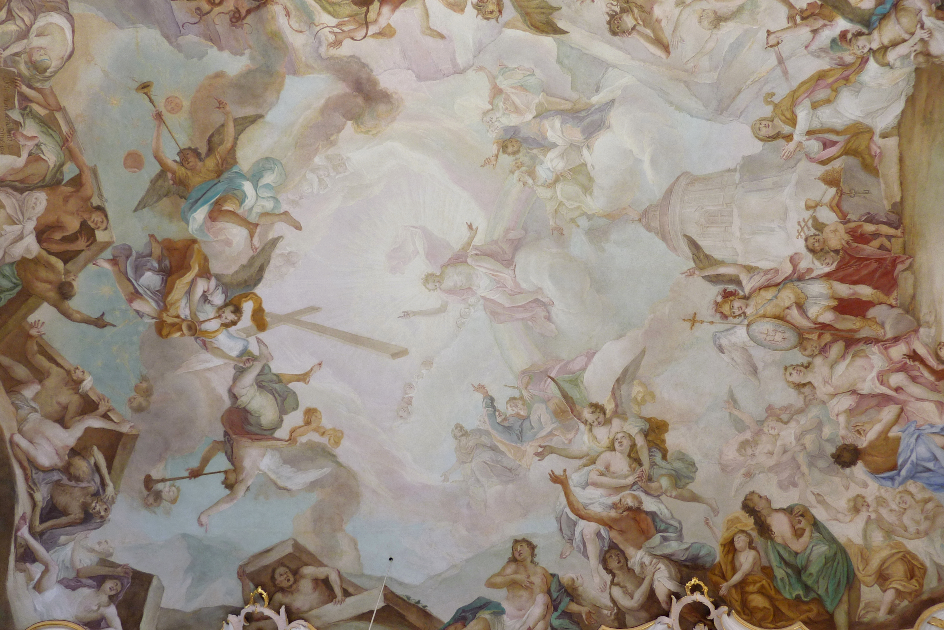 Katholische Pfarrkirche St. Michael in Oberbechingen, einem Ortsteil der Gemeinde Bachhagel im Landkreis Dillingen an der Donau (Bayern), Langhausfresko, von Johann Anwander, von 1766, Darstellung: Jüngstes Gericht